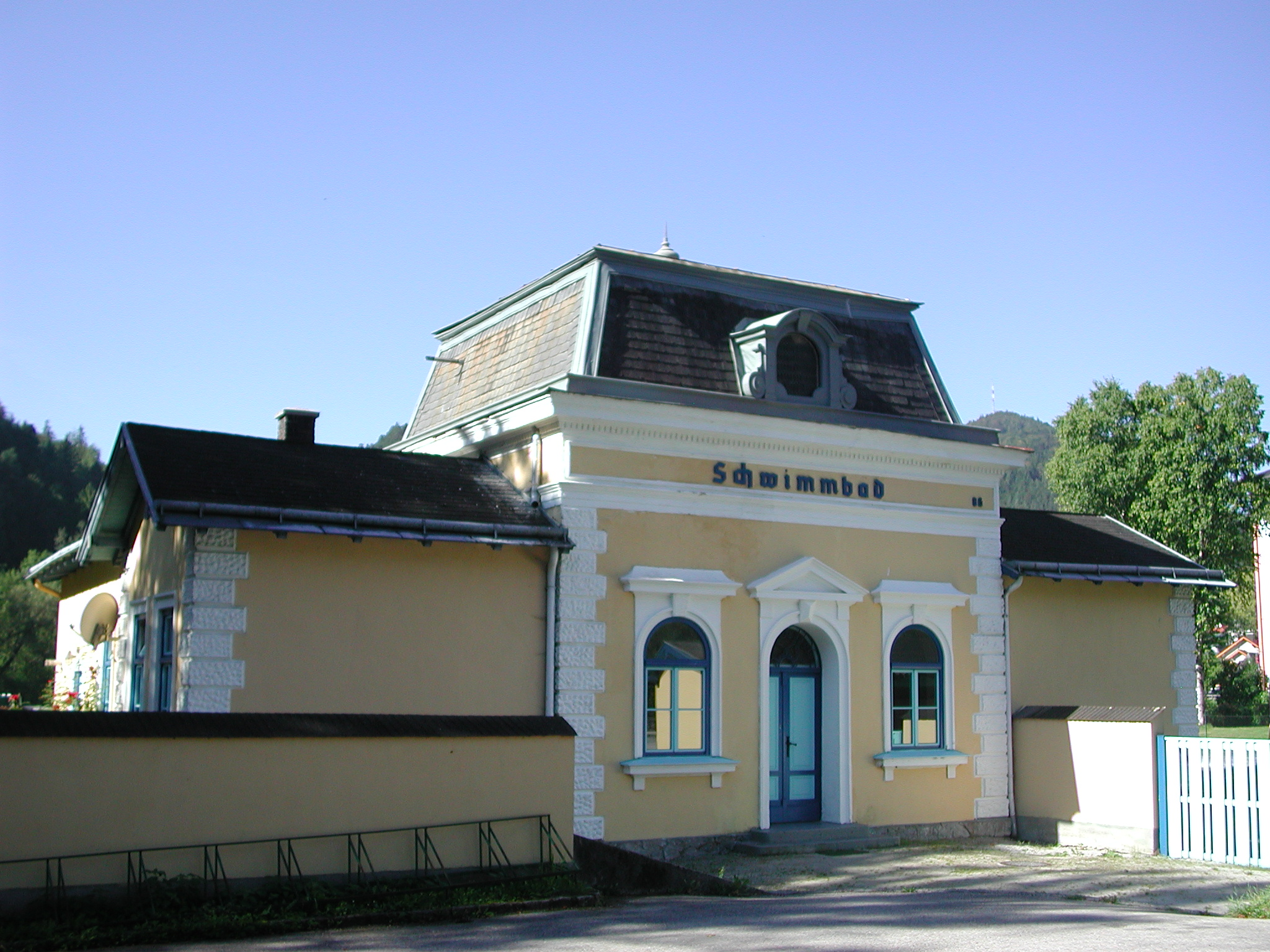 Badeanlage